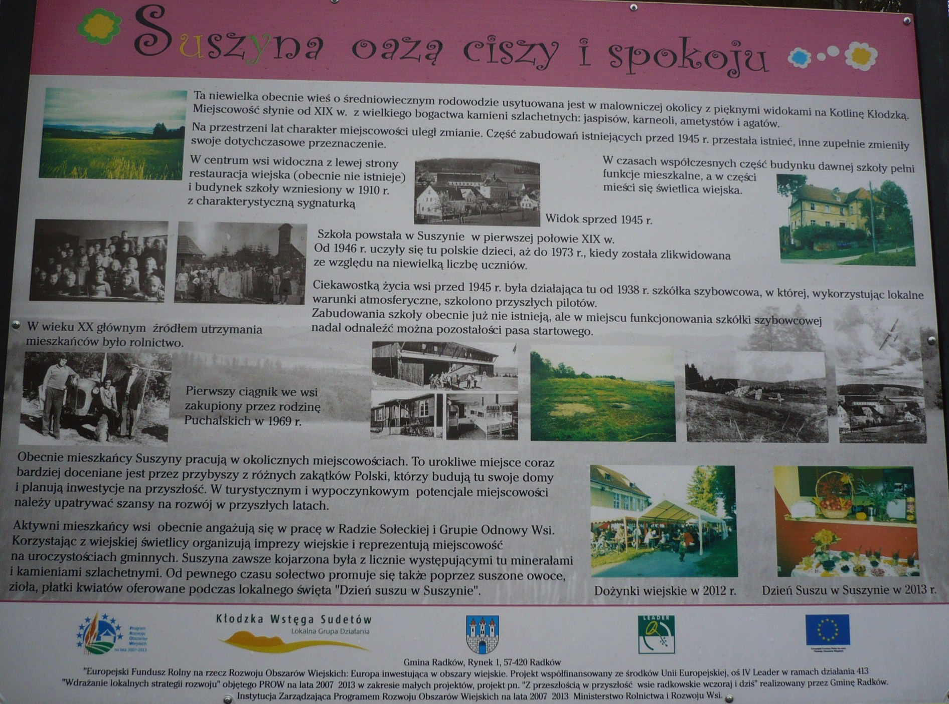 Suszyna. Tablica